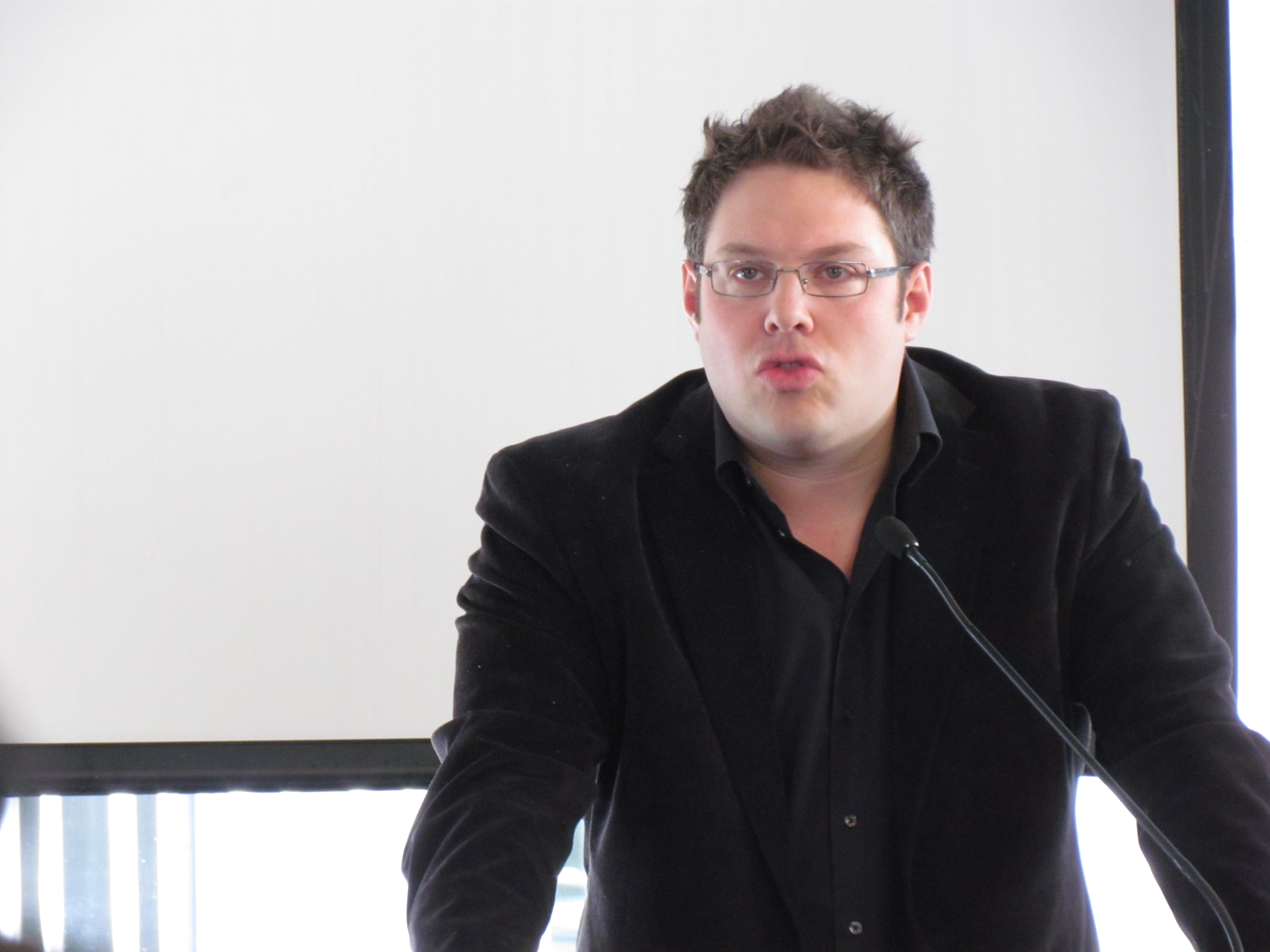 Mathieu Bock-Côté en avril 2012